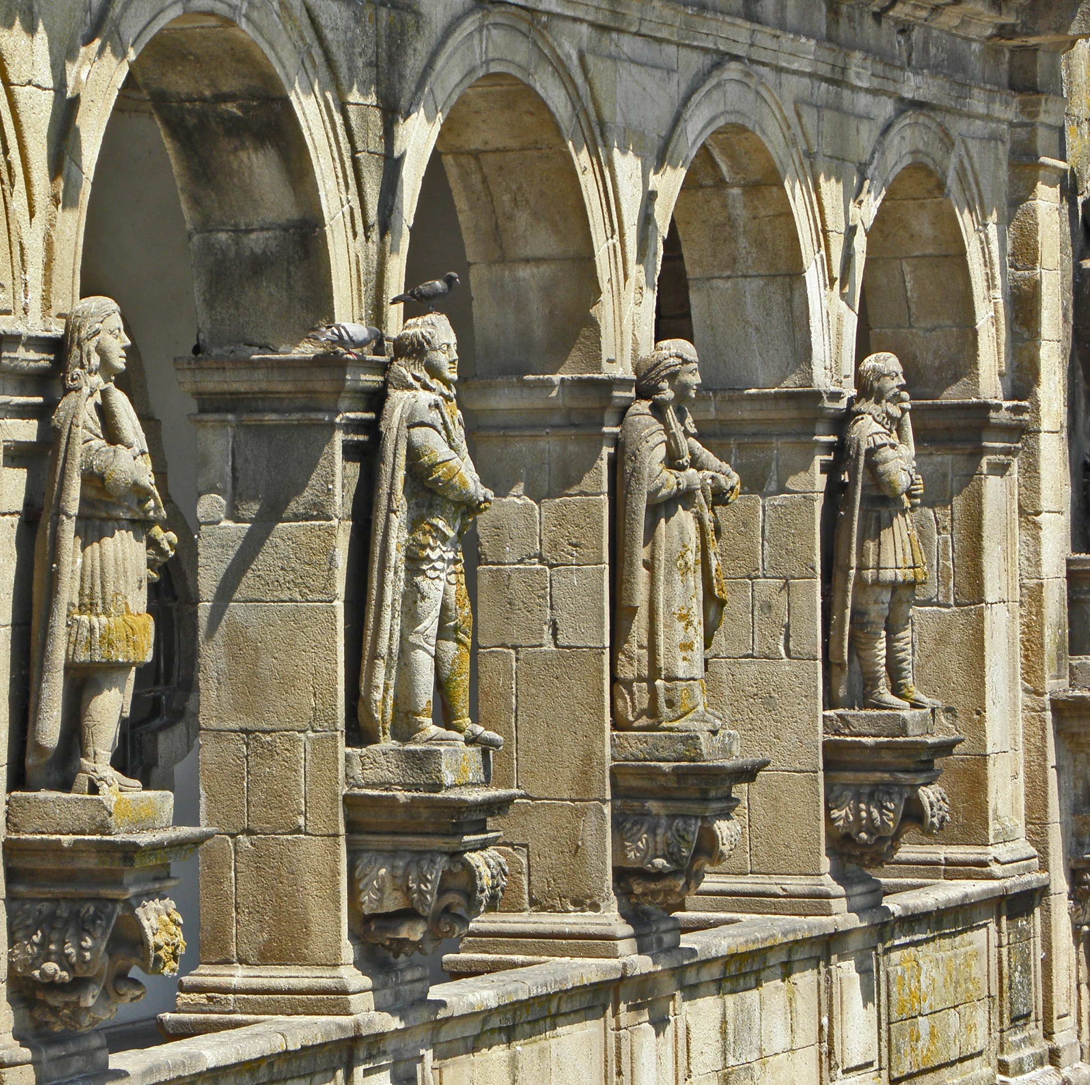 D. João III, D. Sebastião, D. Henrique e Filipe I